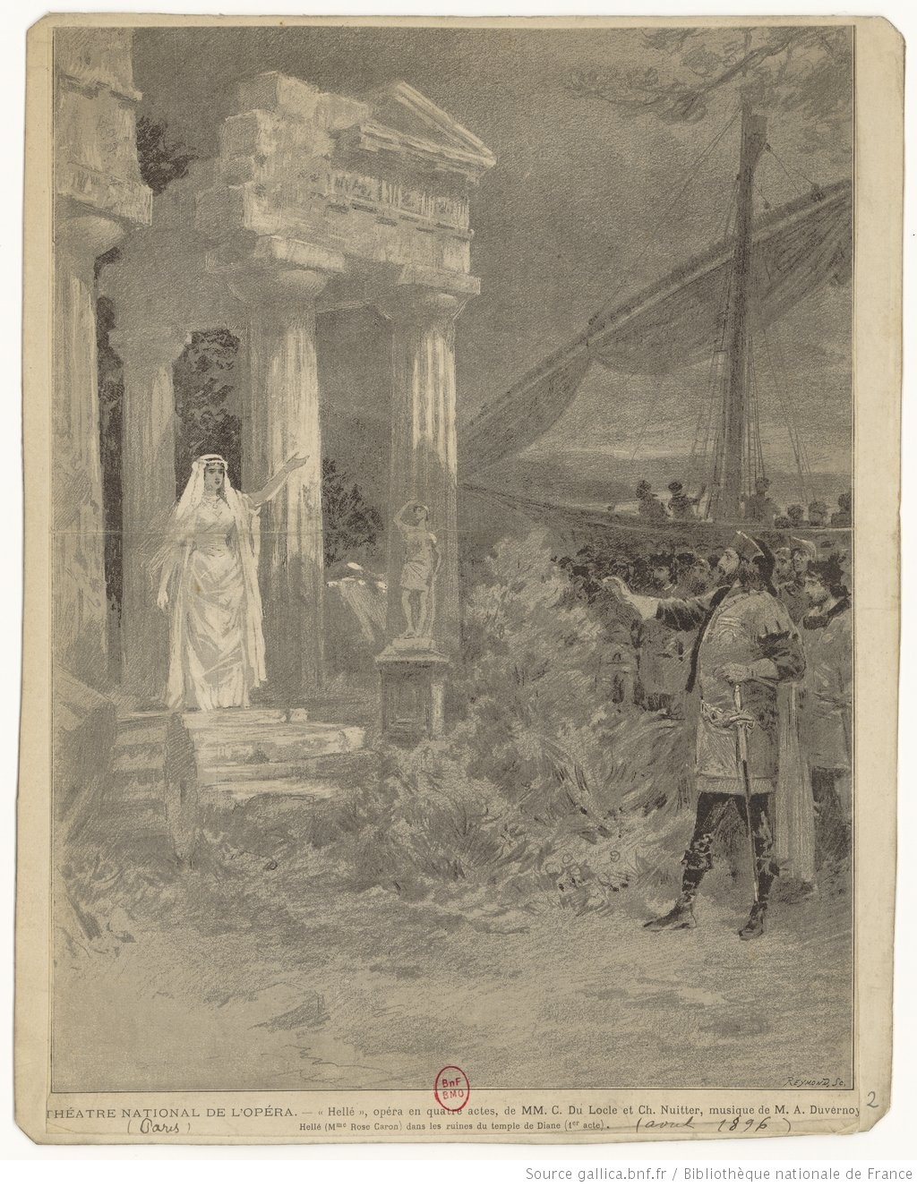 Théâtre national de l'Opéra : "Hellé", opéra en quatre actes, de MM. C. Du Locle et Ch. Nuitter, musique de M. A. Duvernoy ; Hellé (Mme Rose Caron) dans les ruines du temple de Diane (1er acte), gravure Reymond